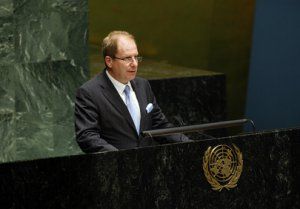 Eric Danon prononce au nom de la France, à la tribune de l'ONU, le discours à l'ouverture de la Conférence d'examen du Traité de non prolifération nucléaire (New York - 4 mai 2010)